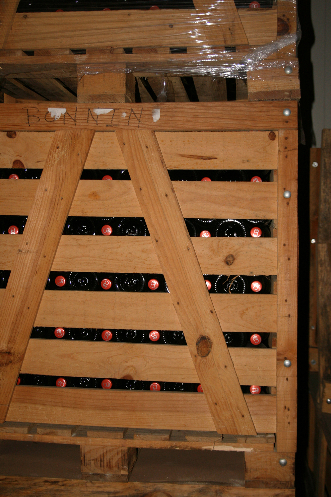 Methode campegnoise, seconde fermentation